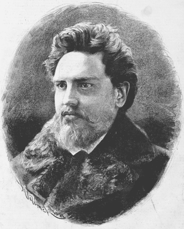 Portréty osobností od Jana Vilímka